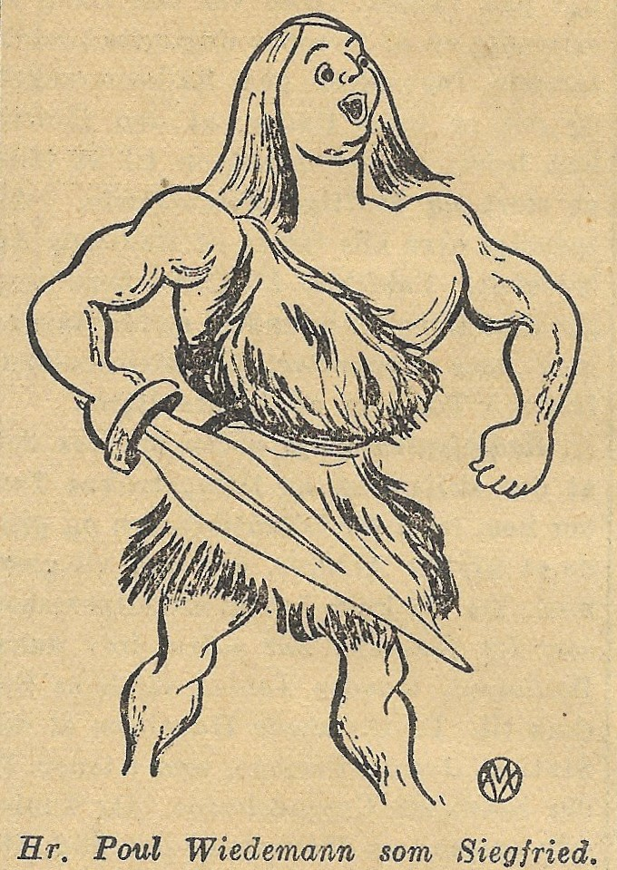 Poul Wiedemann as Siegfried in Richard Wagner's opera "Siegfried". Det kongelige Teater, København. 1929. Avistegning: Valdemar Møller.